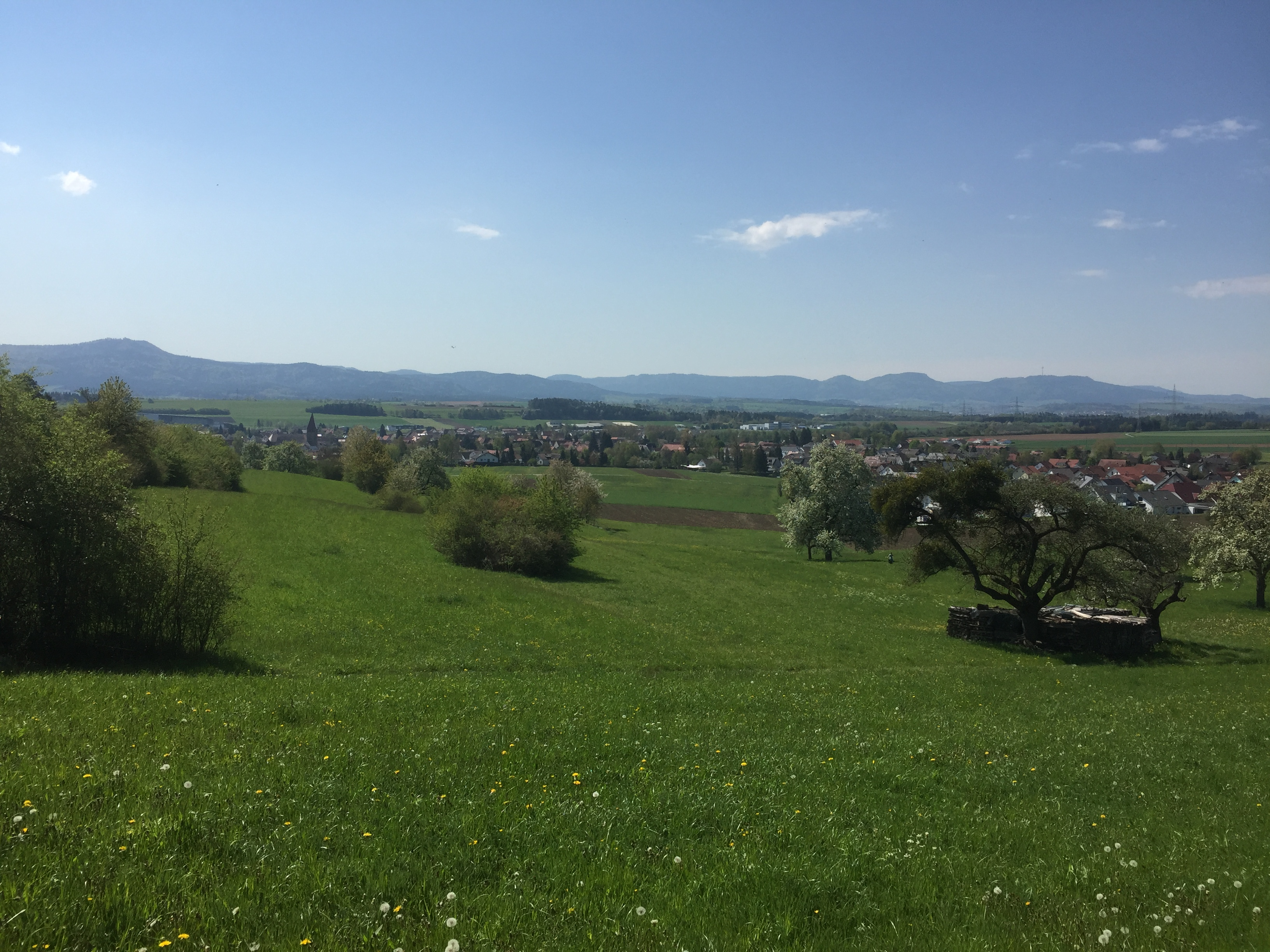 Grosselfingen